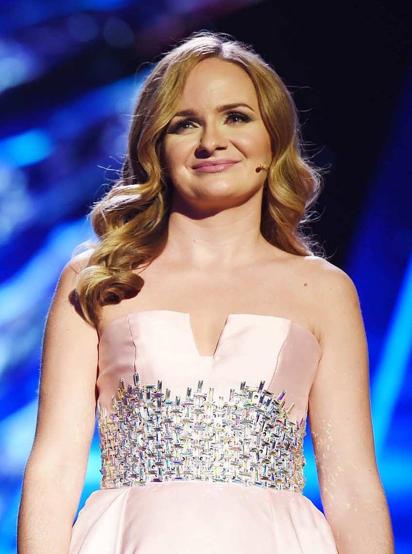 Zuzana Šebová, Krištálové krídlo 2015.